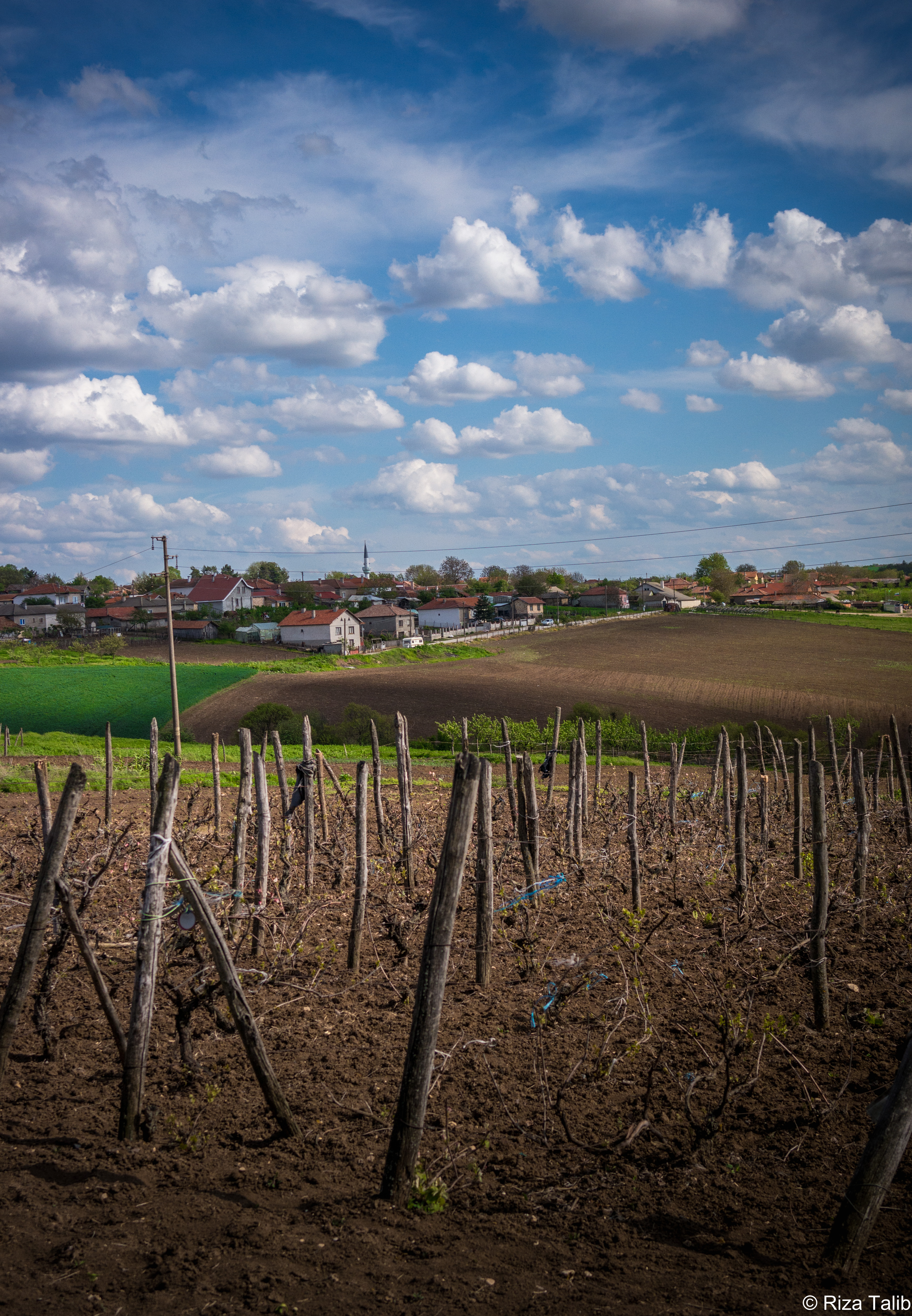 Село Листец